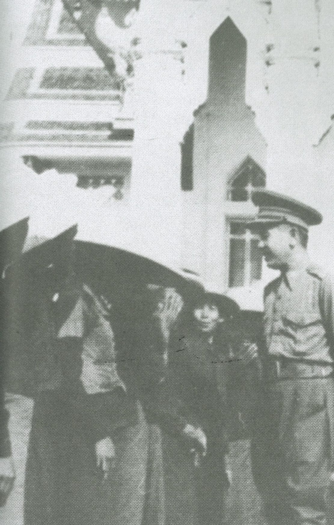 จอมพล ป. พิบูลสงคราม สนทนากับชาวนาที่บริเวณหน้าพระอุโบสถวัดพระศรีมหาธาตุ บางเขน เมื่อวันที่ 12 กันยายน 2485